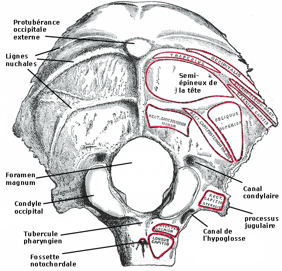 Dessin anatomique de la face externe de l'os occipital, issue de commons et traduit en français par P@d@w@ne